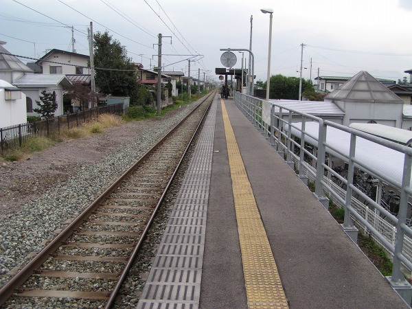 Takatama Station, Tendō, Yamagata, Japan